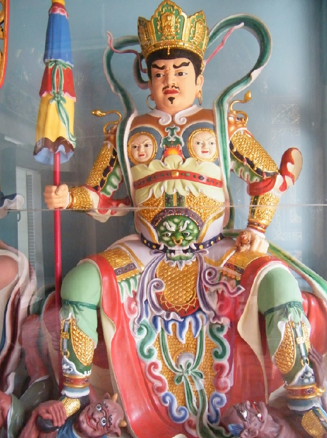 汕头 达濠 青云禅寺 北方多闻天王像